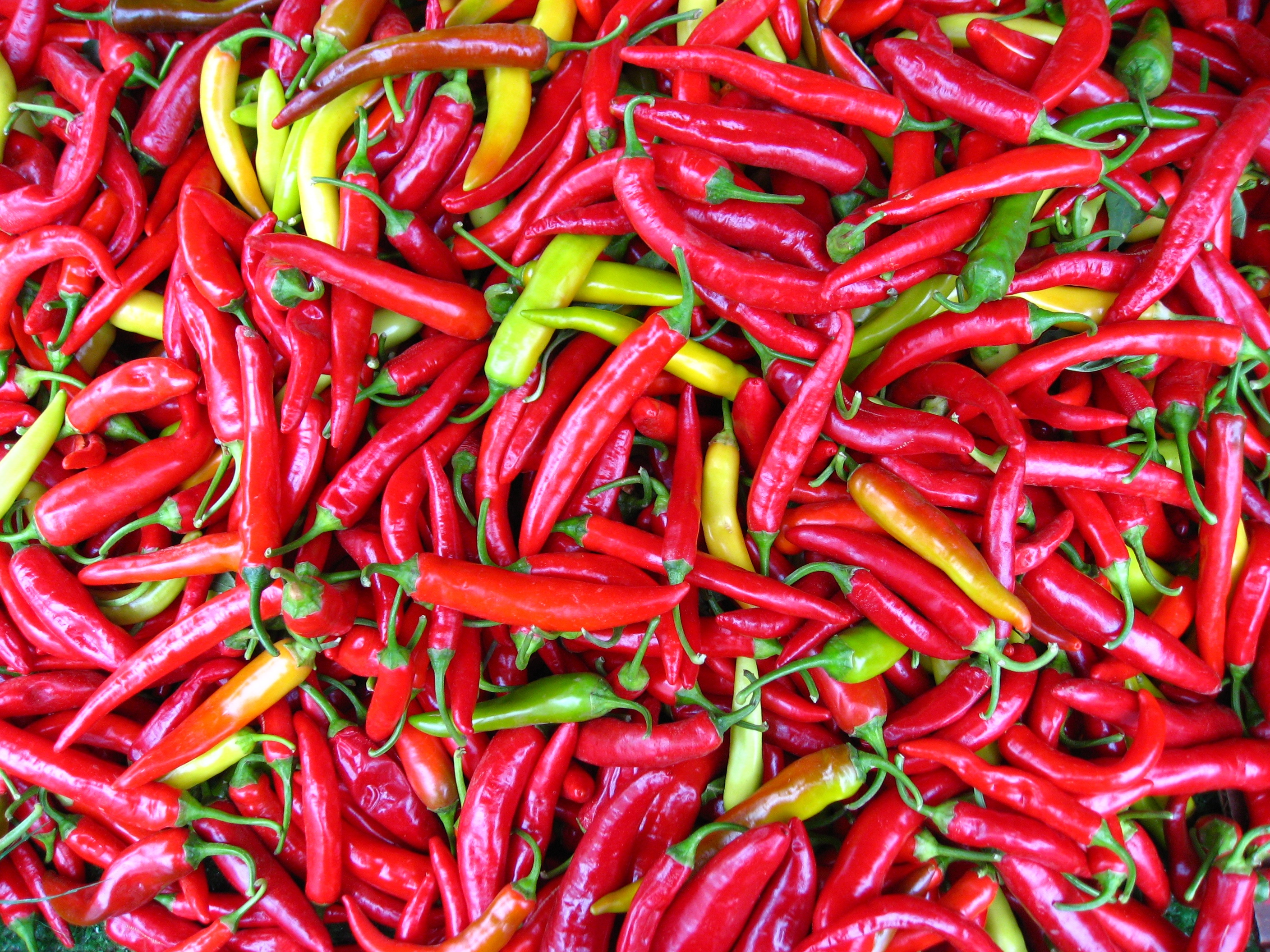 Capsicum frutescens cultivar